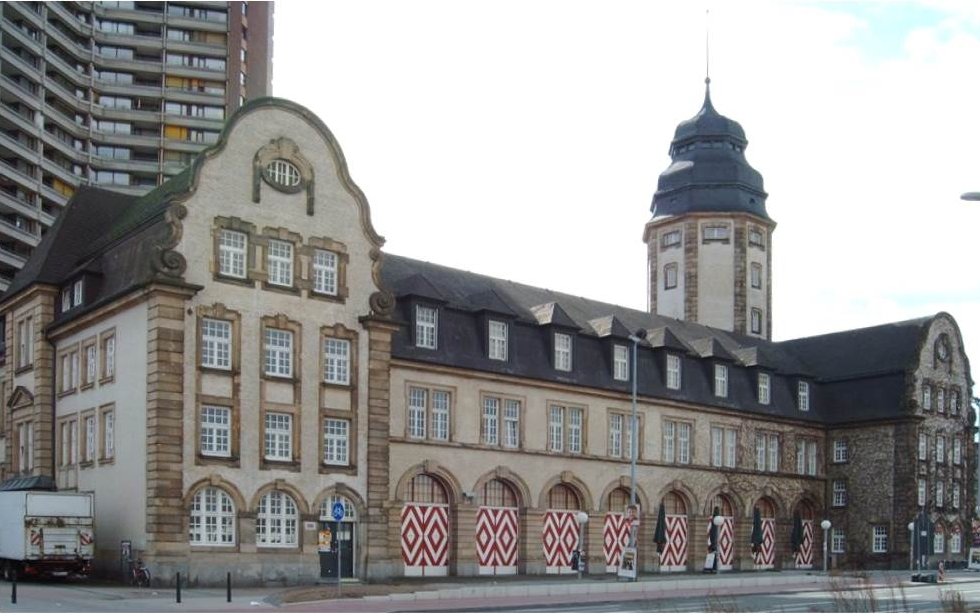 Alte Feuerwache in Mannheim, Germany